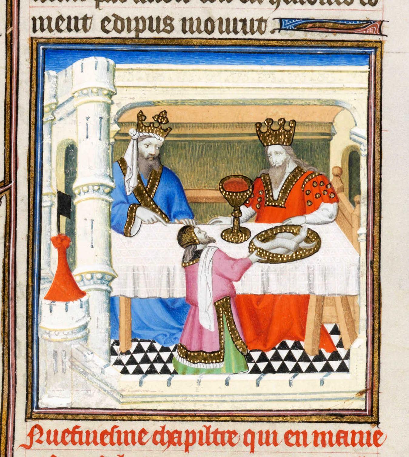 “Atreo fa mangiare a Tieste i suoi tre figli”, miniatura tratta dal codice ‘Des cas des nobles hommes et femmes’ (1410 circa), Genève, Bibliothèque de Genève, Ms. fr. 190/1: Jean Boccace, Des cas des nobles hommes et femmes